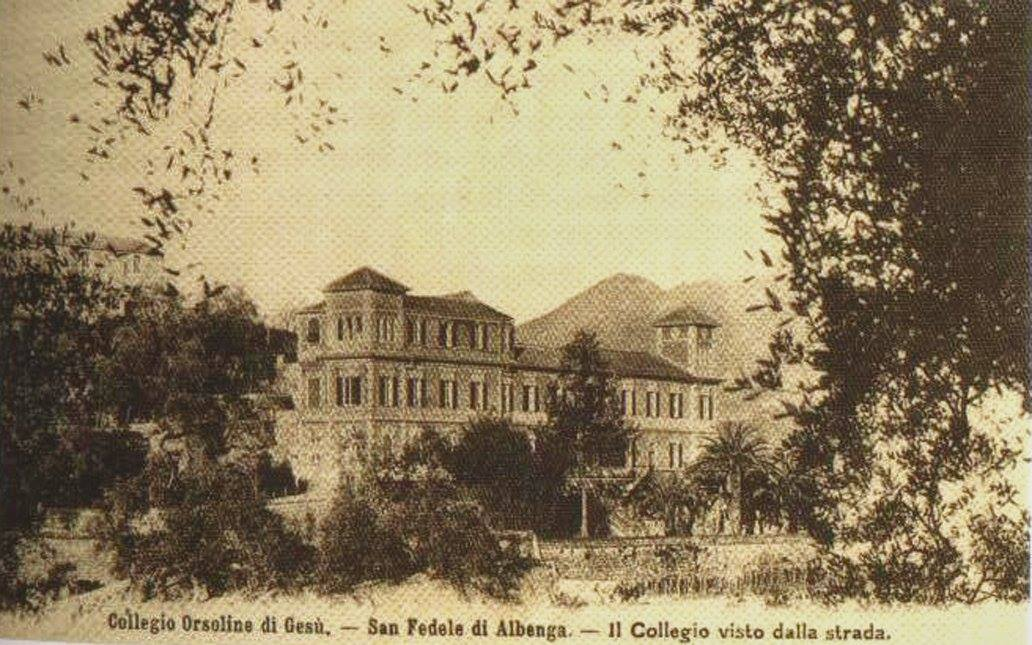 Questa cartolina mostra il Collegio delle Orsoline di Gesù negli anni '20 o '30 del XX secolo, con il primo grande ampliamento realizzato speculare rispetto all'antica Villa Ricca Borea, con una torretta uguale a quella esistente, ma anche una parte di tetto rialzata, per ospitare le educande che facevano richiesta.